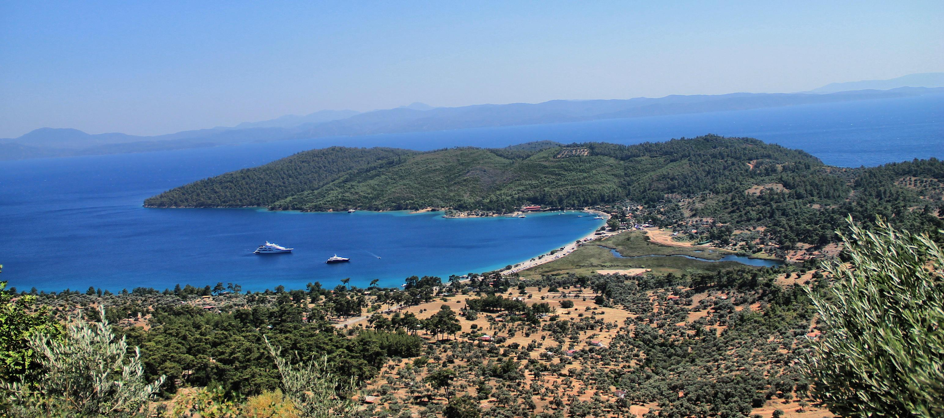 48220 Kultak/Milas/Muğla, Turkey